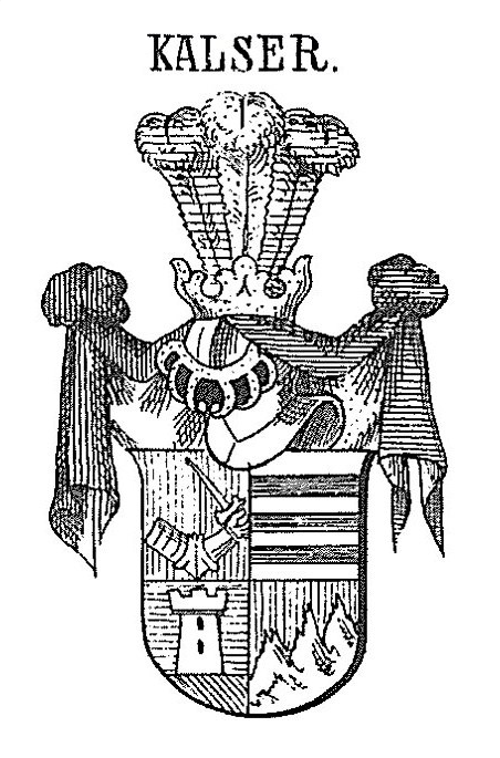 Wappen der Kalser, Edle von Maasfeld, 1826 vom österr. Kaiser verliehen.